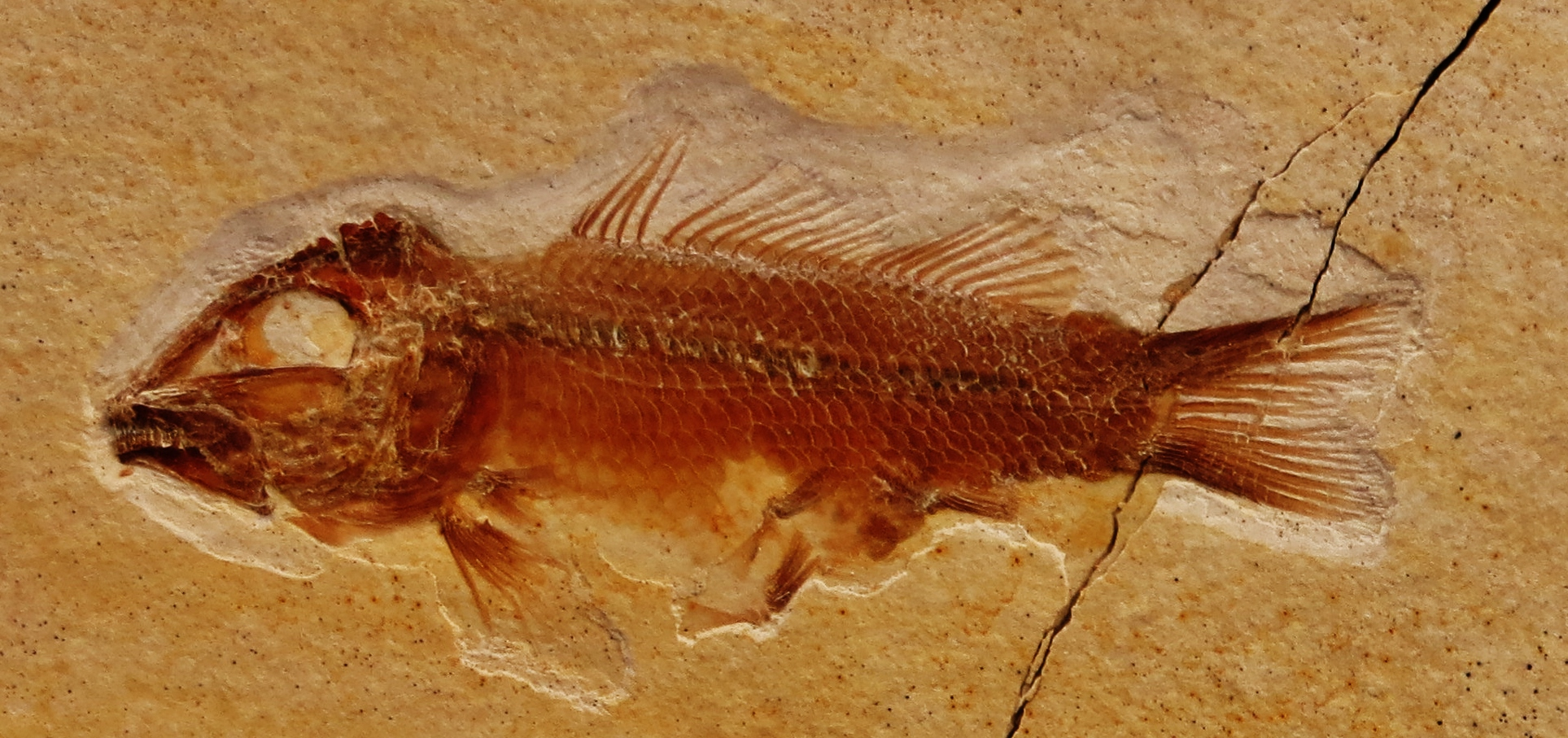 Took the picture at Jura-Museum, Eichstaett